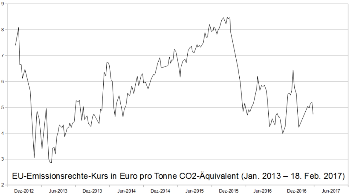 EU-Emissions-Preis